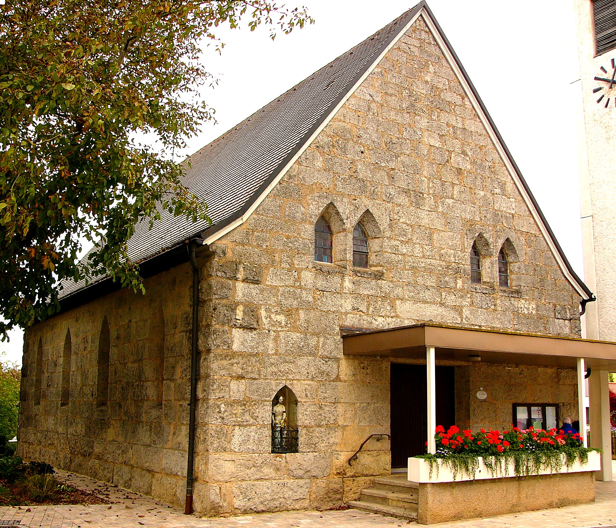 Steinsichtiger Kalksteinbau mit überdachtem Vorbau, eingezogenem Chor und Campanile, Satteldach, 1934 von Ludwig Fuchsenberger, Turm 1971; mit Ausstattung des 18. JahrhundertsThis is a photograph of an architectural monument.